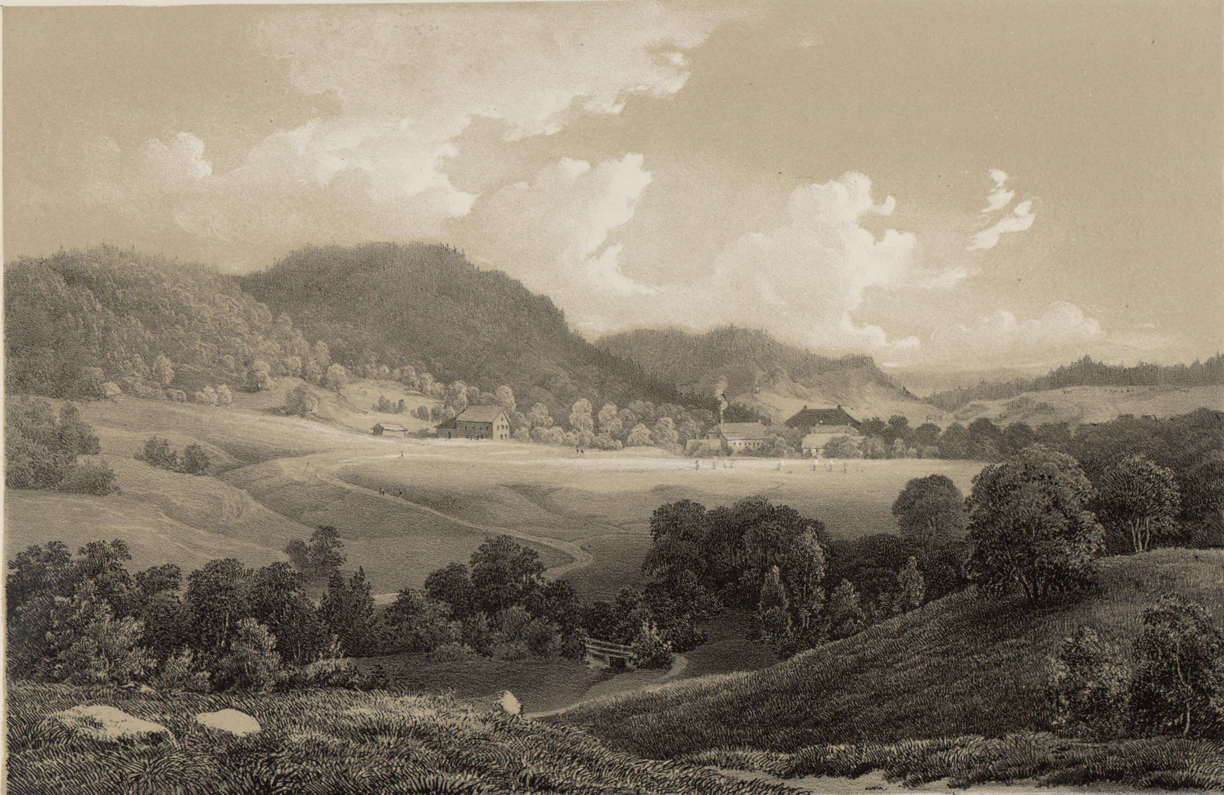 Illustrasjon hentet fra boken "Norge fremstillet i Tegninger" av Asbjørnsen, P.Chr. og utgitt av Chr. Tønsberg (no, 1848)